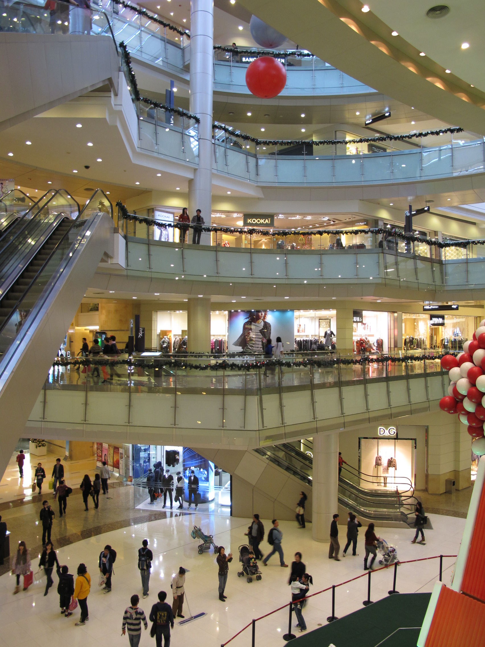 Mixc Shenzhen Phase 1 Atrium